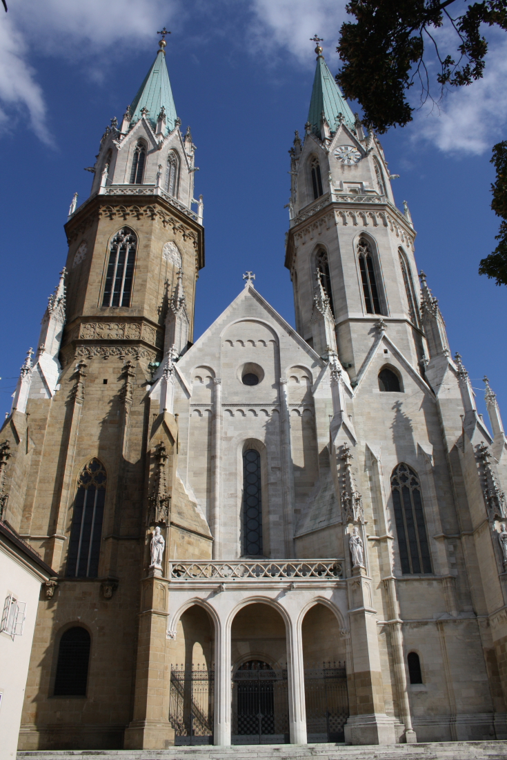 Nordwestansicht (Portal mit den Türmen) der Stiftskirche Klosterneuburg in Niederösterreich